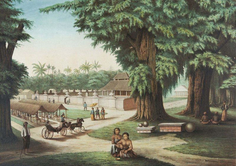 Litho. De litho is gemaakt naar een tekening van F.C. Wilsen. Pagina 5 van de map "De Indische Archipel", Den Haag, 1865-1876, met daarin 24 kleurenlitho's, van objectnr. 3728-430 t/m 3728-479.. Een markt